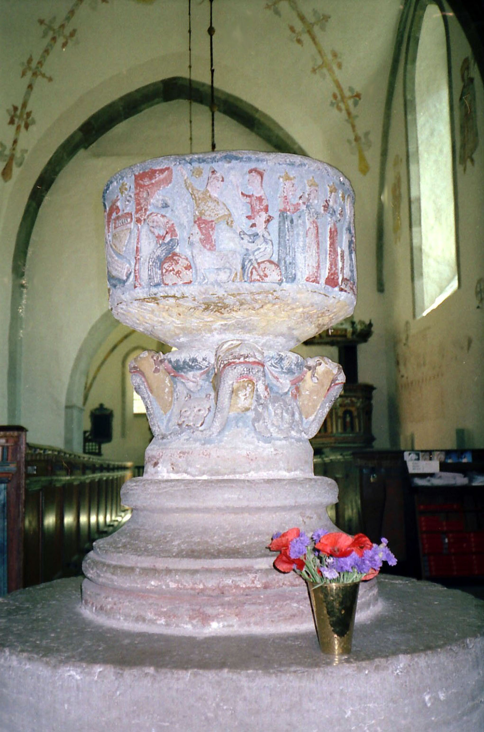 Väskinde kyrkas dopfunt.